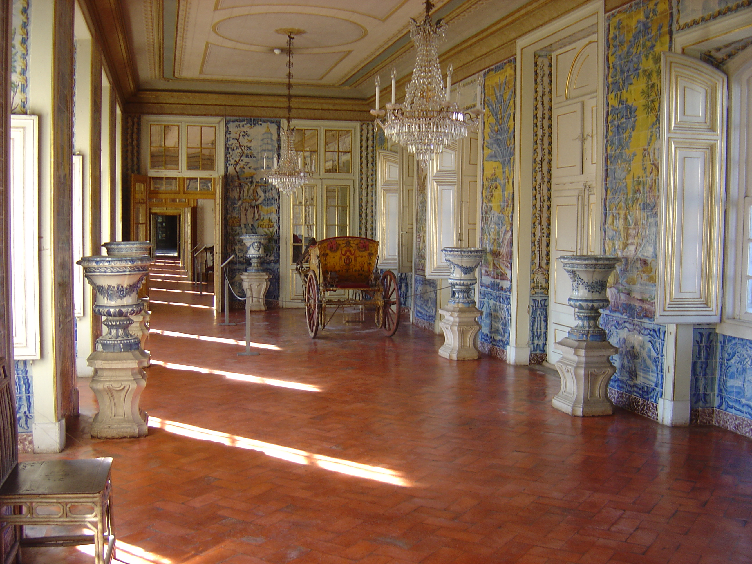 Queluz National Palace, Portugal